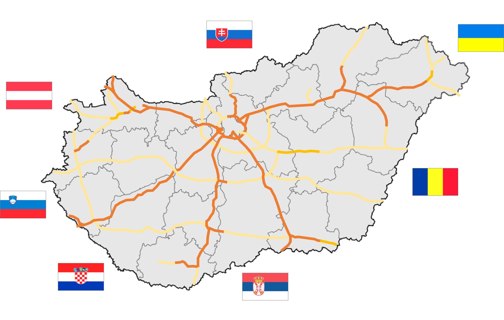 Magyarország autópálya hálózata 2014.július